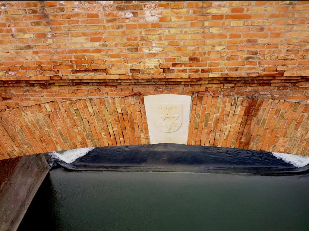 הכתובת על הגשר